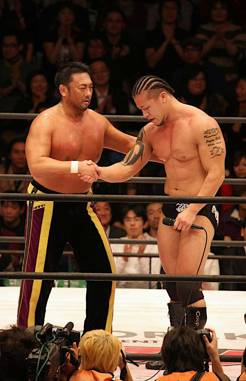 Toshiaki Kawada and Zeus shaking hands